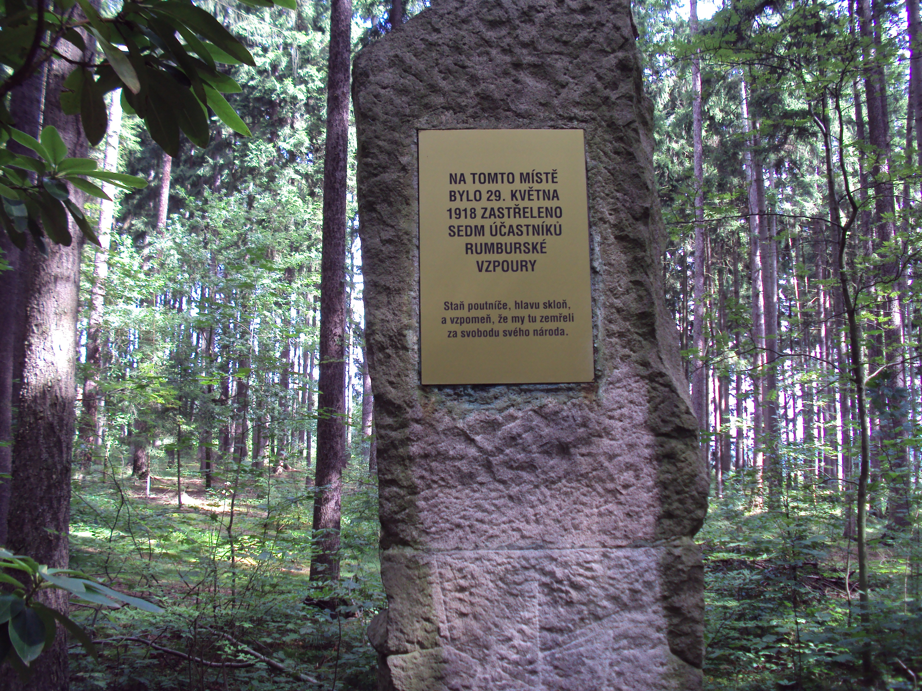 Místo popravy účastníků rumburské vzpoury je 100 metrů od brány lesního hřbitova v témže lese